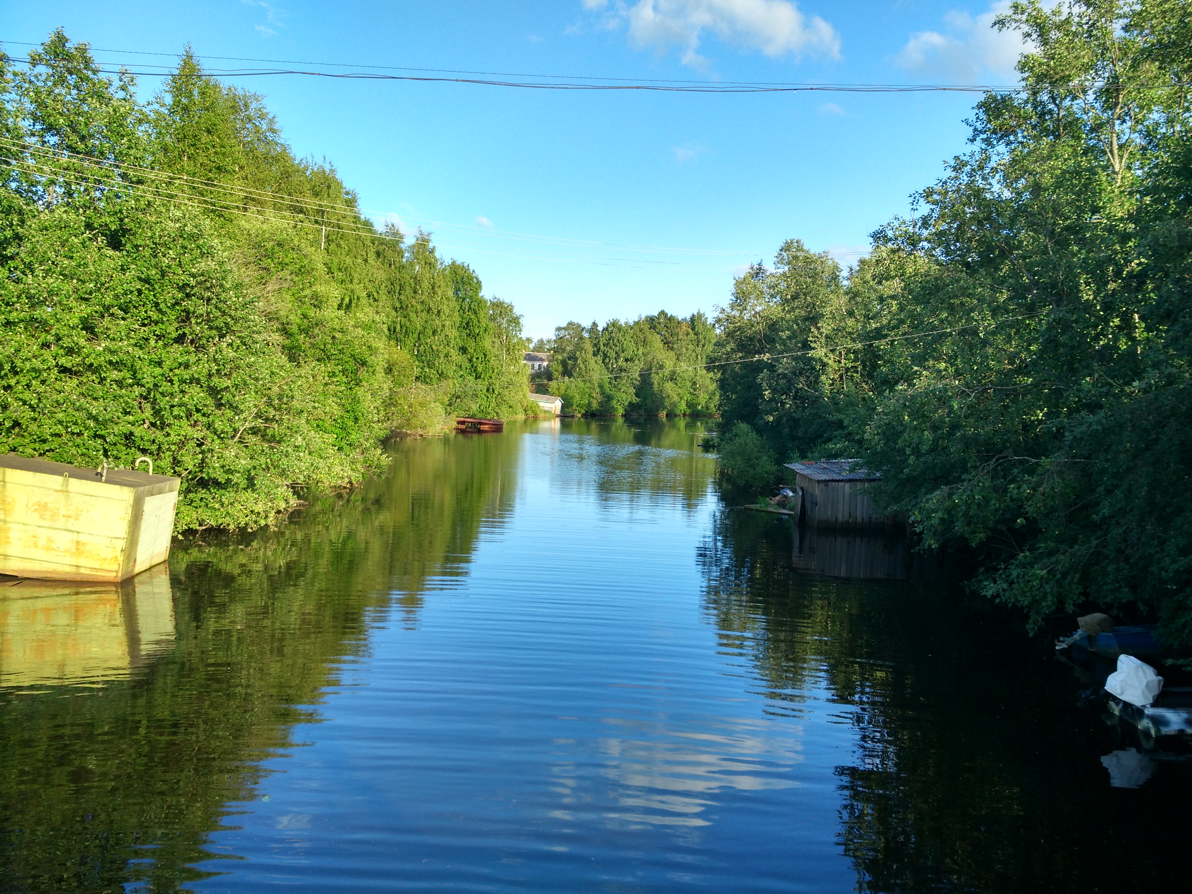 Участок канала: Вытегра, Вытегорский район, Вологодская область